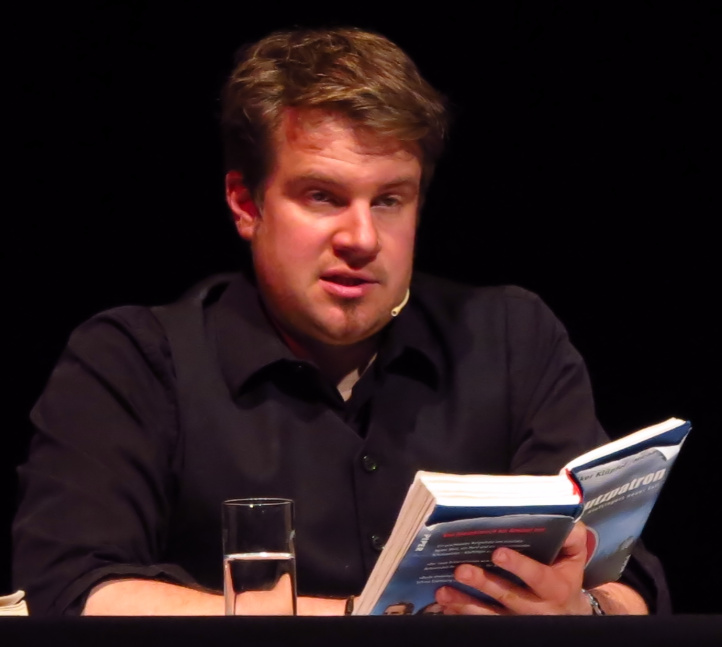 Michael Kobr bei der Lesung "Schutzpatron" am 2012-04-30, im Veranstaltungsforum Fürstenfeld in Fürstenfeldbruck